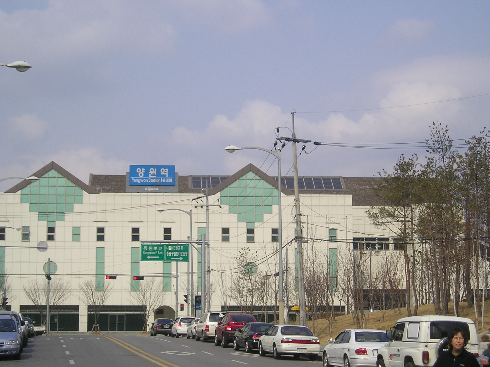 양원역